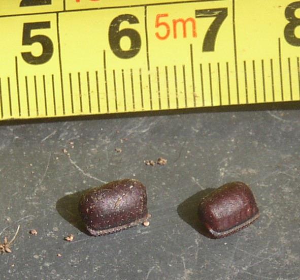 Zwei Eikapseln von Periplaneta Americana; Florianópolis, SC, Brasilien